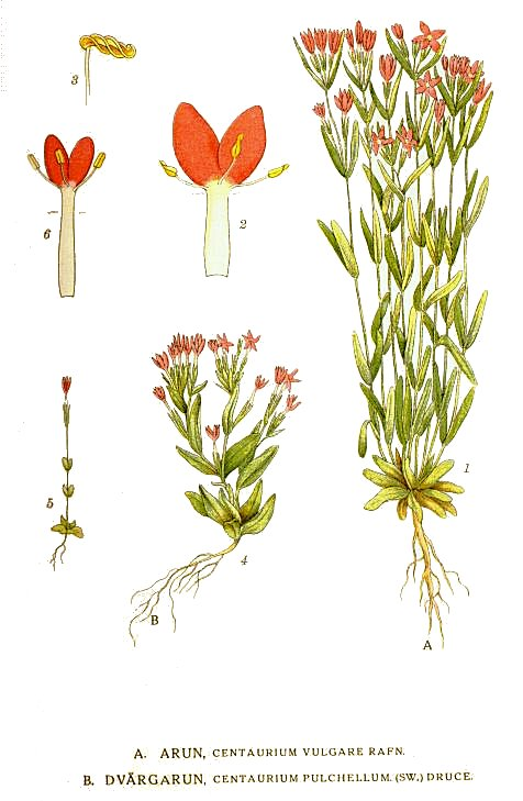 A. Centaurium littorale (Turner) Gilmour B. Centaurium pulchellum (Sw.) Druce Original Description A. Arun, Centaurium vulgare Rafn. B. Dvärgarun, Centaurium pulchellum (Sw.) Druce.